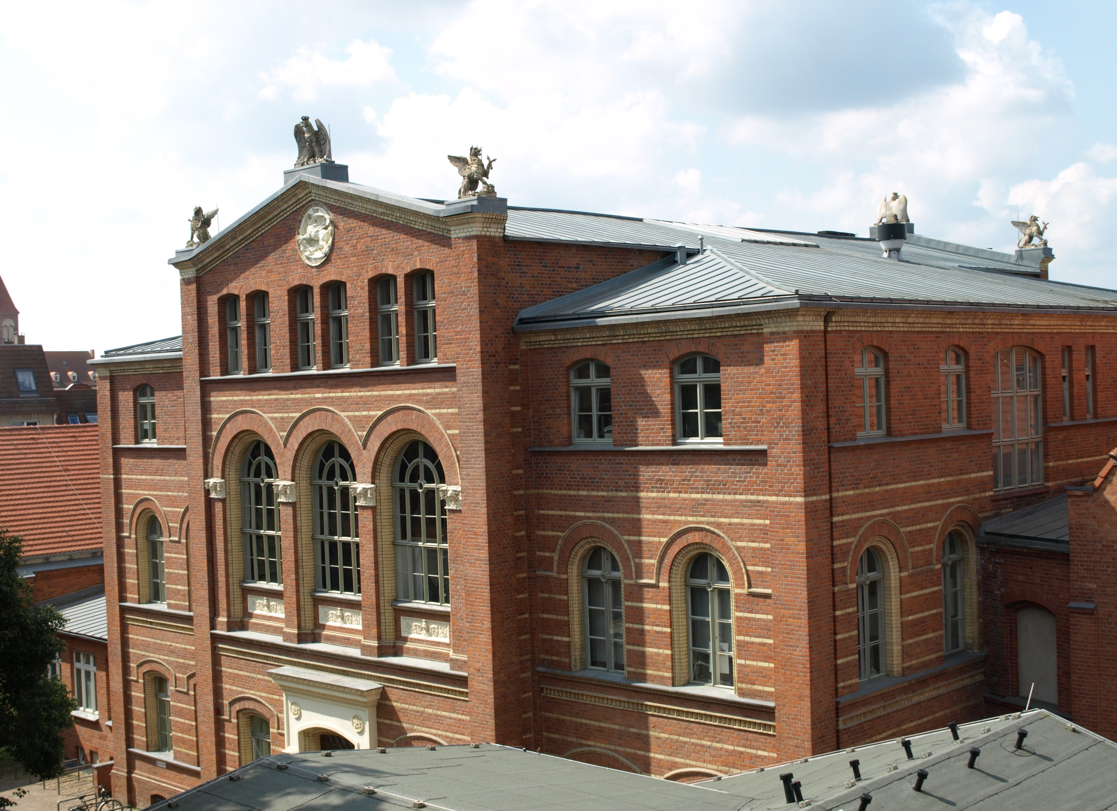 Institut für Anatomie der Universität Greifswald